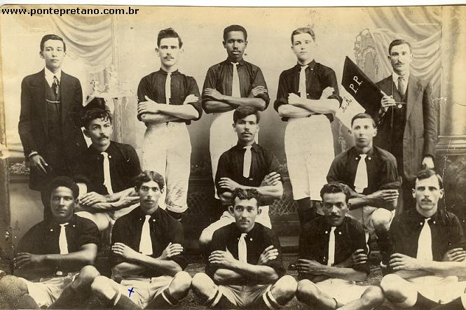 Primeiro time da Ponte Preta : Lima, Silvio, Oliveira, Aranha, Rodolpho Hartmann, Carlos Vieira, Fogaça, Ricardo Hartmann e Miguel. Segundo Time da Ponte Preta : Young, Dicto, Osvaldinho, Augusto Vieira, J.Scott, Burghi, A.Scott, Tonico, Walter, Largon, Tilimann.